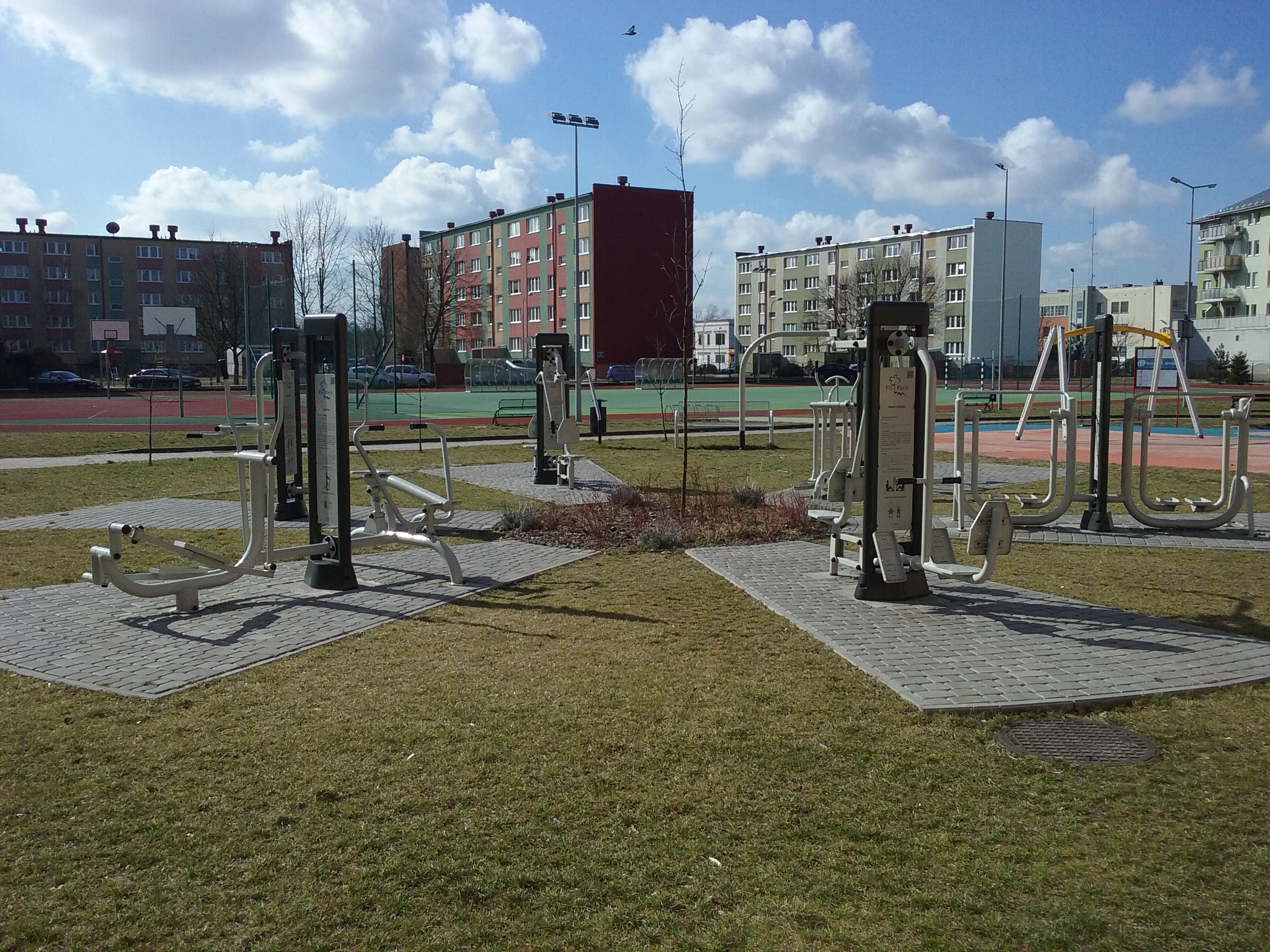 Ogólnodostępna siłownia na wolnym powietrzu w 60-tysięcznym Tomaszowie Mazowieckim, w województiwe łódzkim, PL/EU, CC0